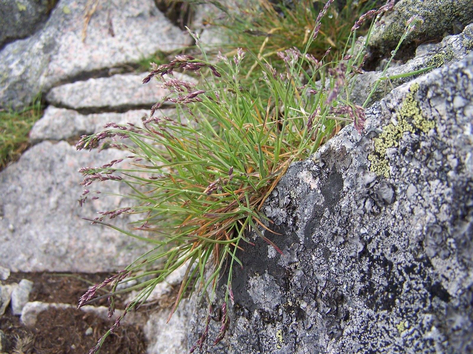 Poa laxa (pl.wiechlina wiotka), habitat: Tatra Mountains Kozi Wierch